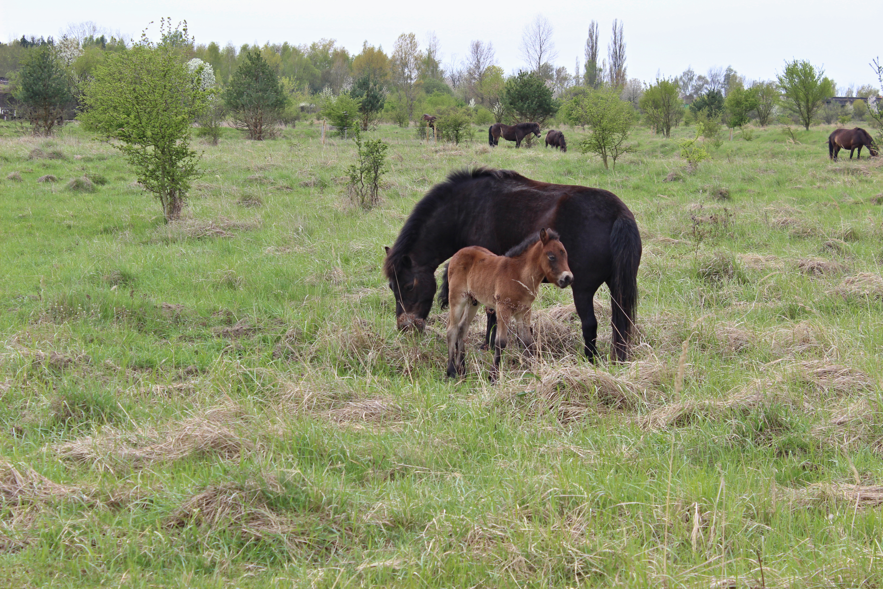 Klisna a hříbě exmoorského pony v Přírodní rezervaci Milovice.